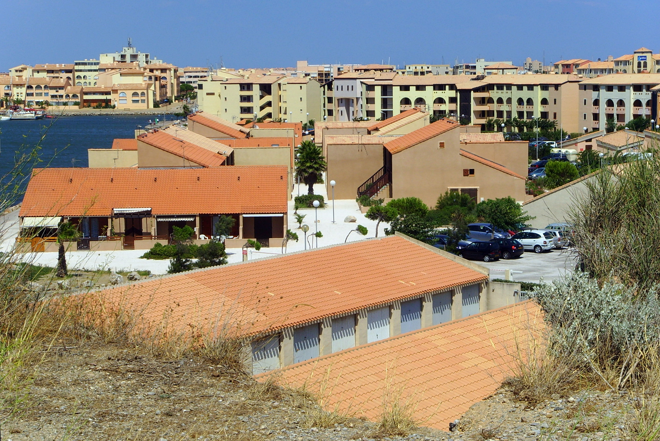 Leucate, Aude, France: Port Leucate photographer: Gerbil, summer 2006